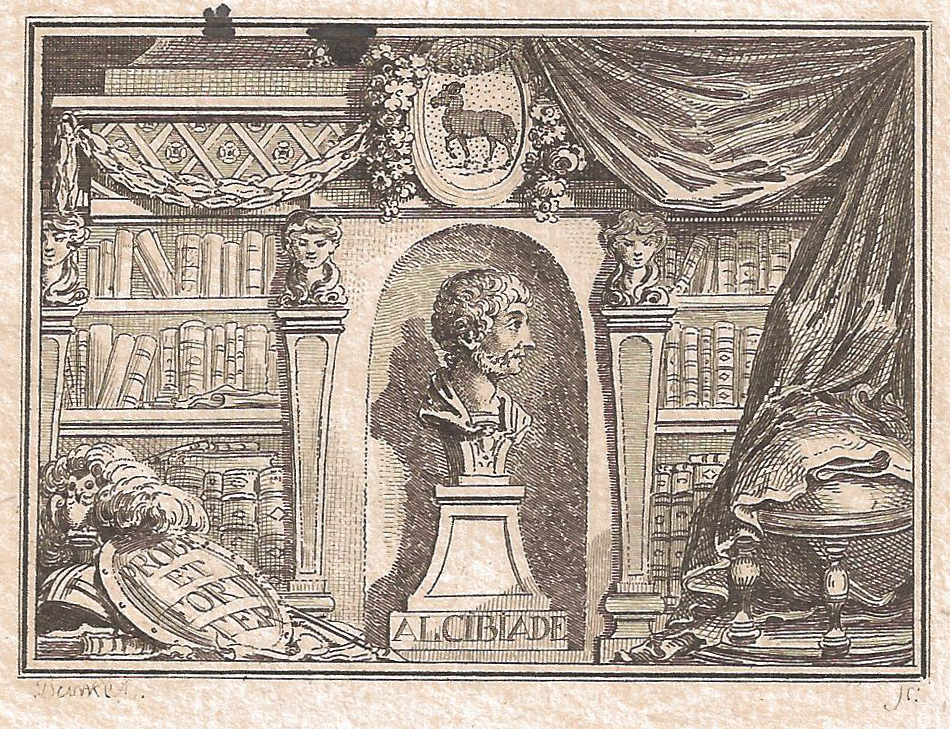 Exlibris Samuel Rudolf Frisching, Rümligen